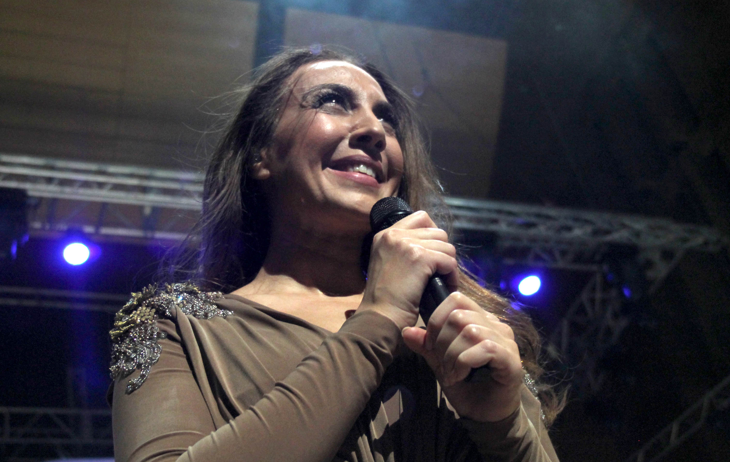 Mónica Naranjo en concierto en Valladolid.